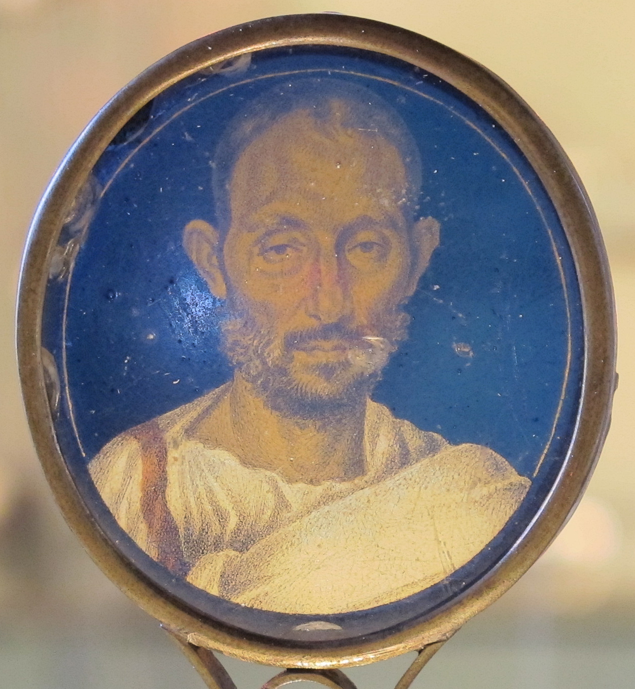 Museo Archeologico Nazionale G.C.Mecenate - MIBAC This is a photo of a monument which is part of cultural heritage of Italy.